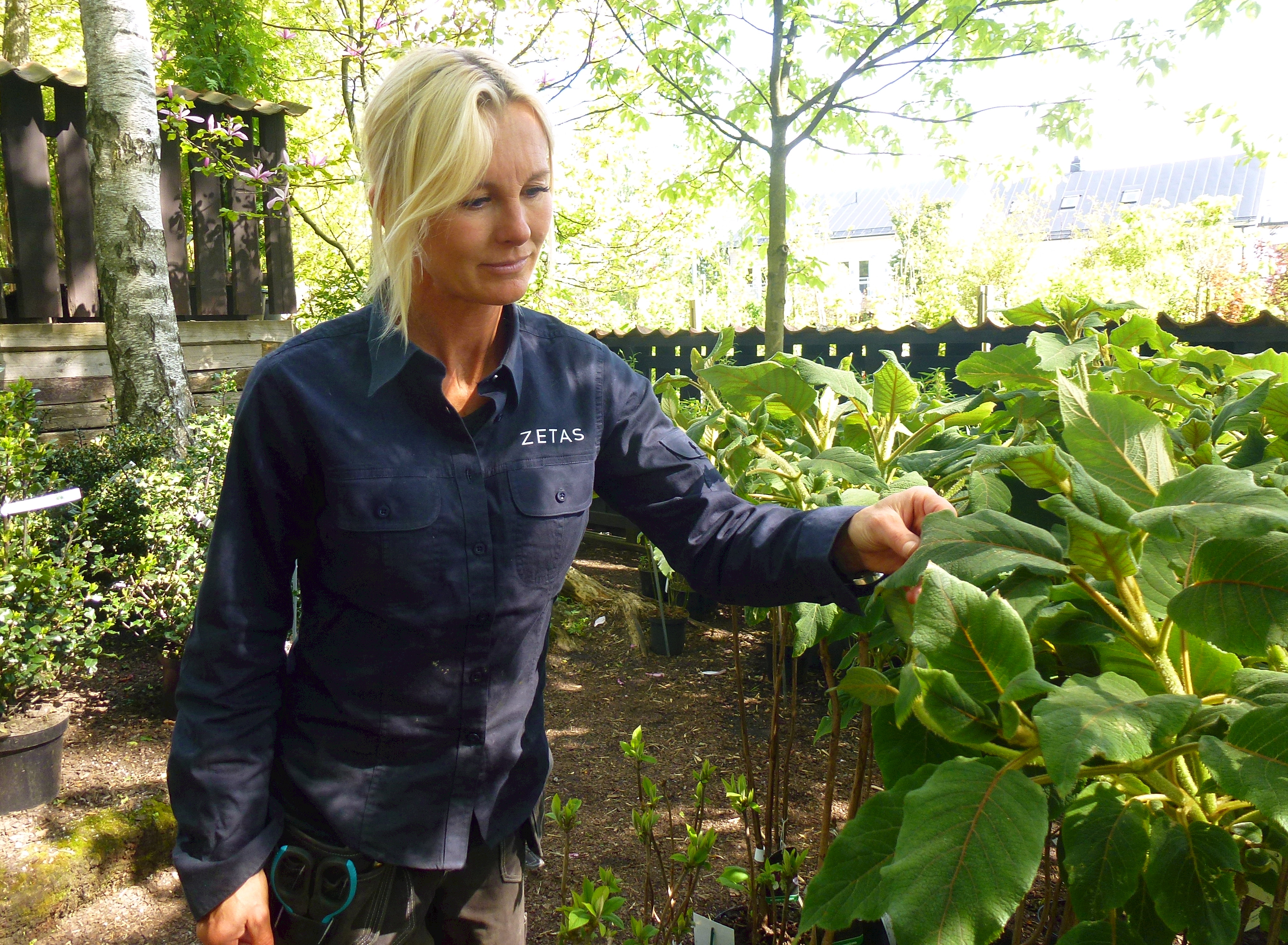 Zetas trädgård i Segeltorp, delägaren Victoria Skoglund